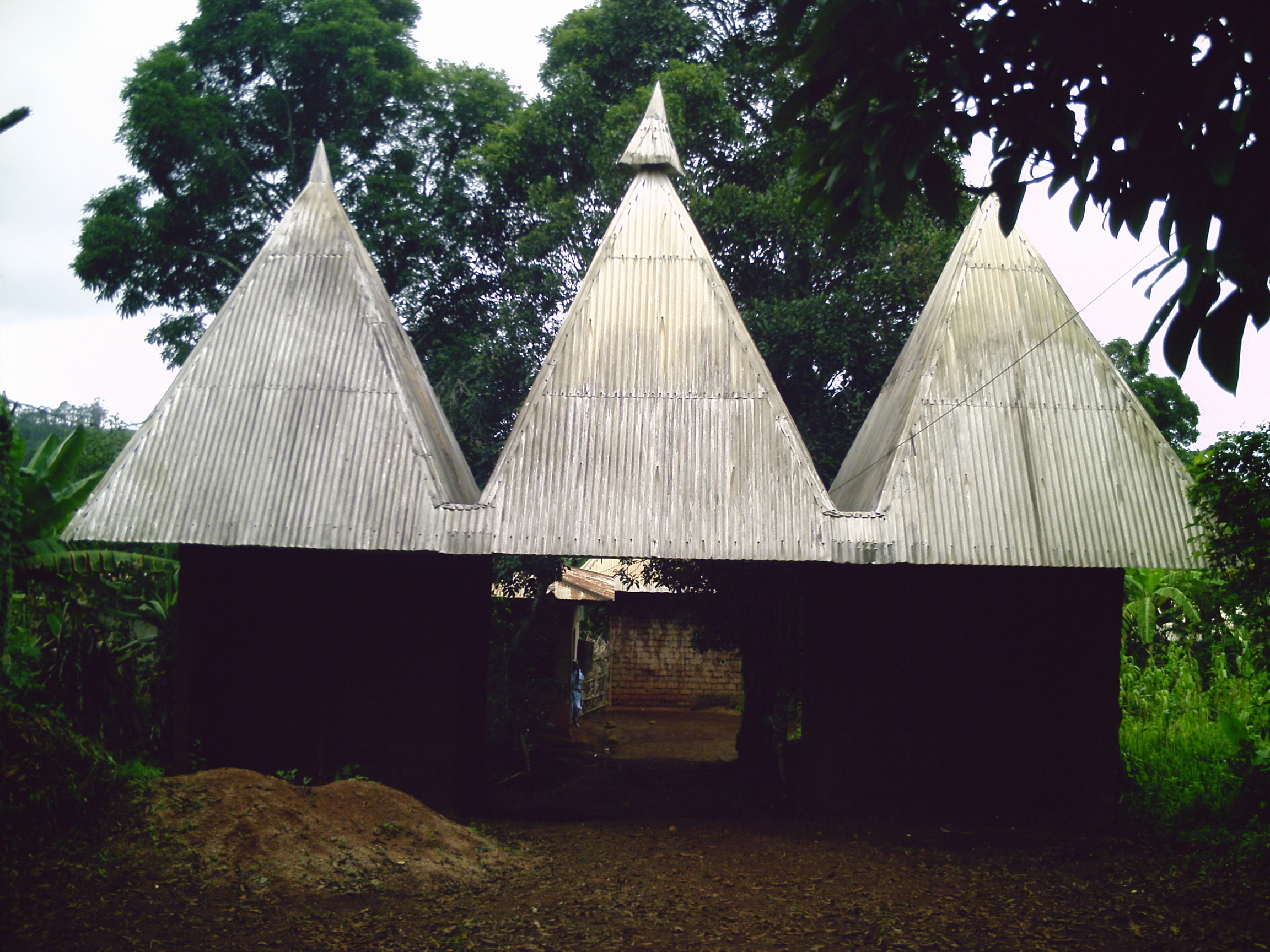 Case traditionnelle à l'entrée d'une concession à Baham, Ouest du Cameroun en Afrique centrale. Cette case n'est pas habitée et sert juste de décoration à la concession.